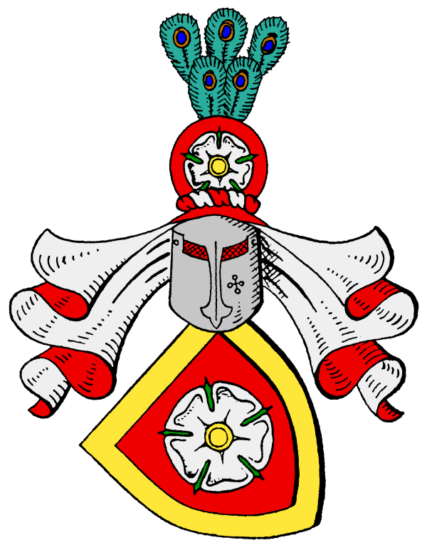 Wappen derer von Müllenheim - Rechberg